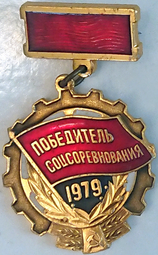 Знак "Победитель соцсоревнования 1979". Сфотографировано в краеведческом музее г. Ленкорань, Азербайджан